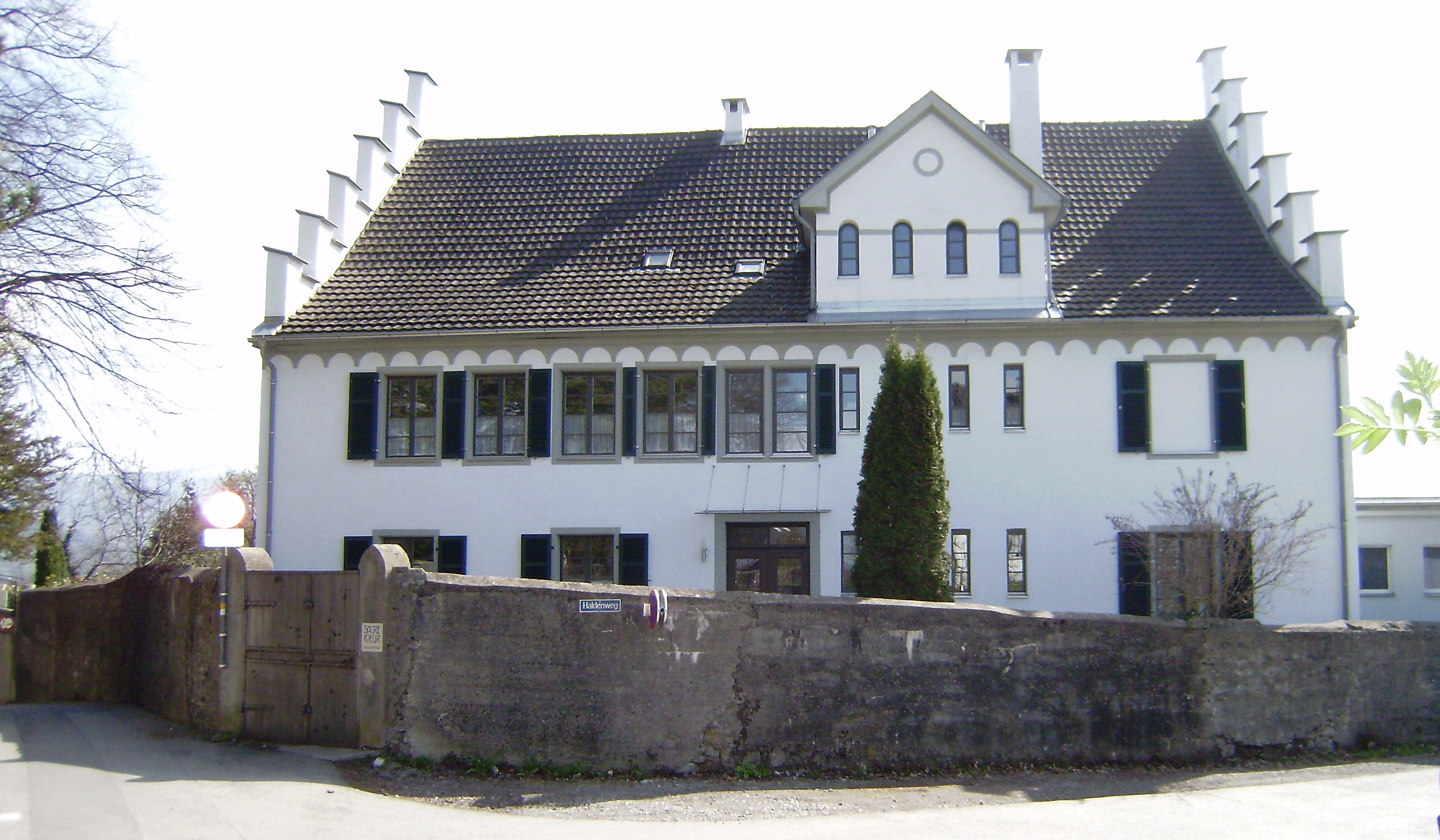 Wohnhaus